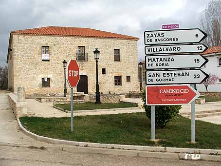 El Camino del Cid puede ser recorrido por carretera